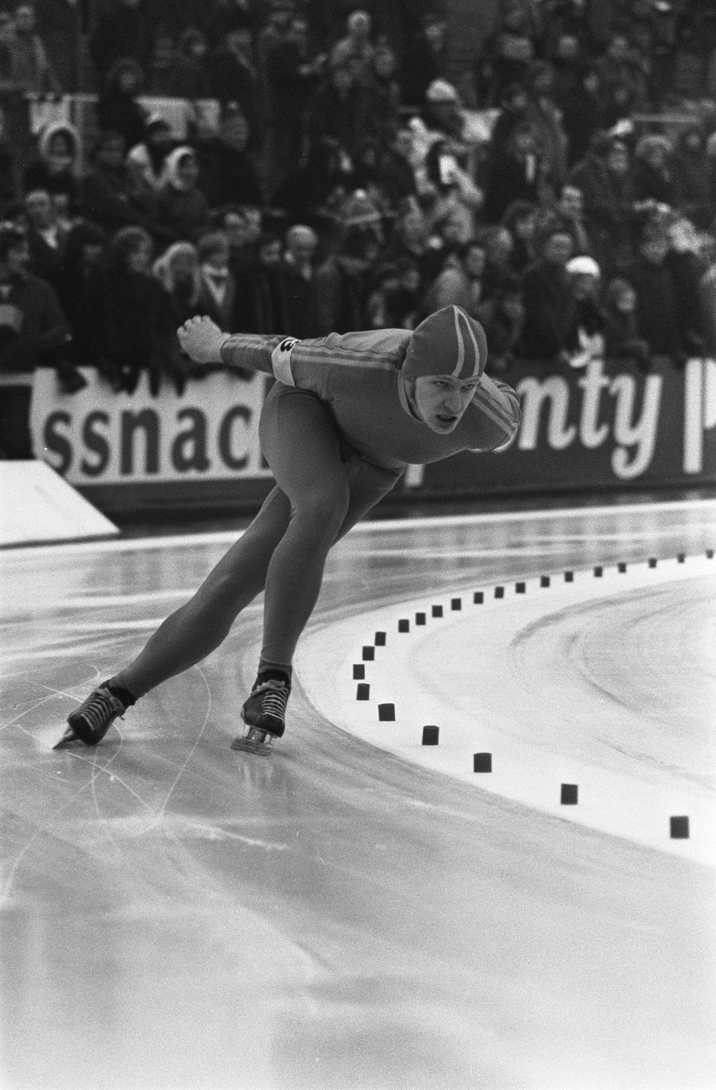 Collectie / Archief : Fotocollectie Anefo Reportage / Serie : [ onbekend ] Beschrijving : Schaatswedstrijden voor eerste ISSL World Cup voor prof op De Uithof in Den Haag , nummer 15 Ove Konig (Zweden) en nummer 16 en 18 Linkovesi, nummer 17 Ivar Datum : 6 januari 1973 Locatie : Den Haag, Zuid-Holland Trefwoorden : schaatsen, sport Persoonsnaam : De Uithof, ISSL World Cup Fotograaf : Verhoeff, Bert / Anefo Auteursrechthebbende : Nationaal Archief Materiaalsoort : Negatief (zwart/wit) Nummer archiefinventaris : bekijk toegang 2.24.01.05 Bestanddeelnummer : 926-1427